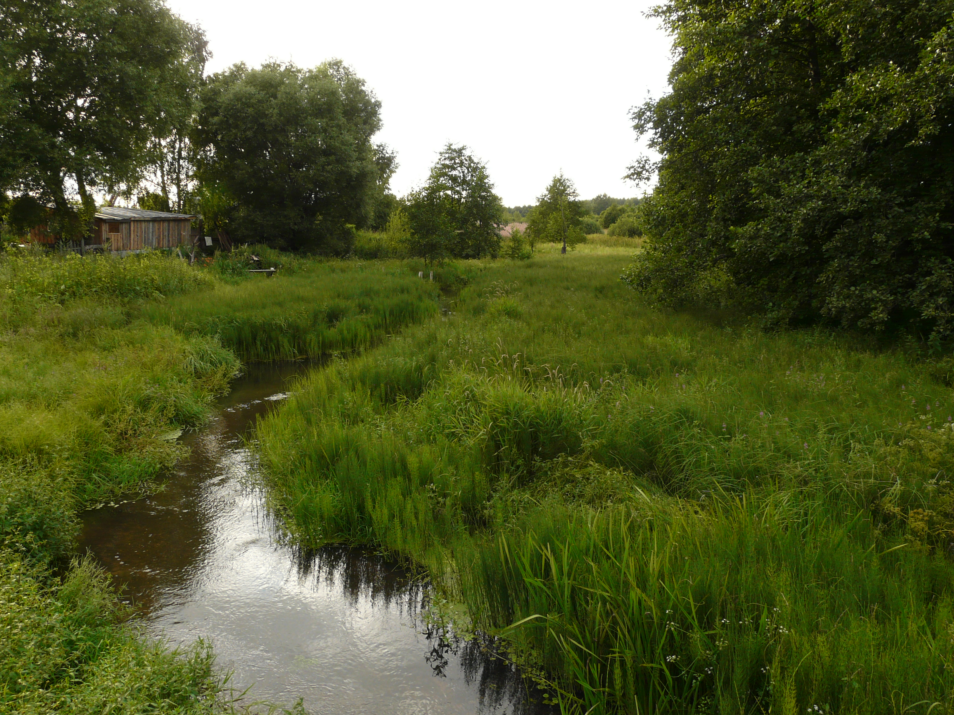 Река пошма в Григорове